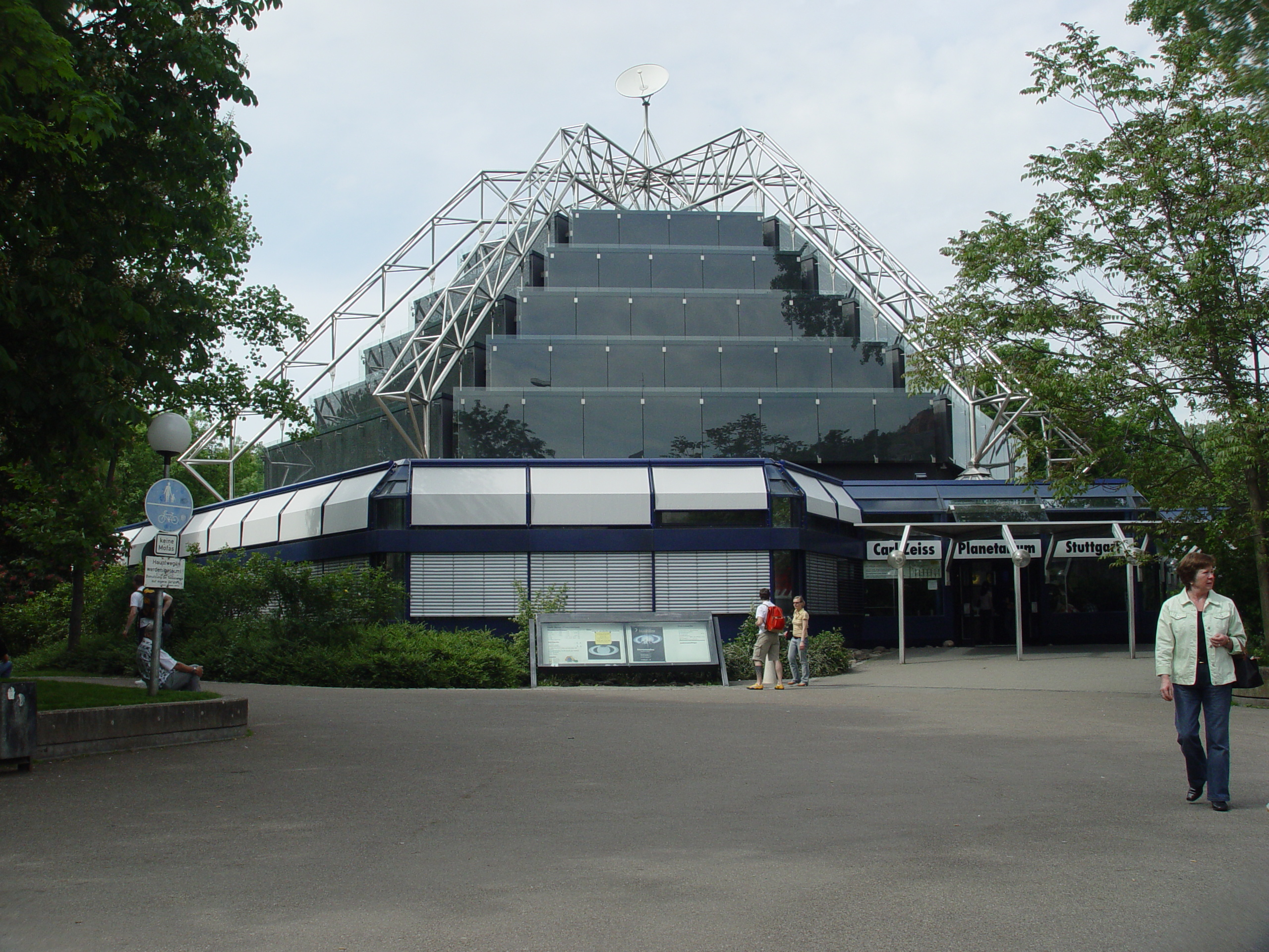 Das Gebäude des Carl Zeiss Planetariums in Stuttgart.